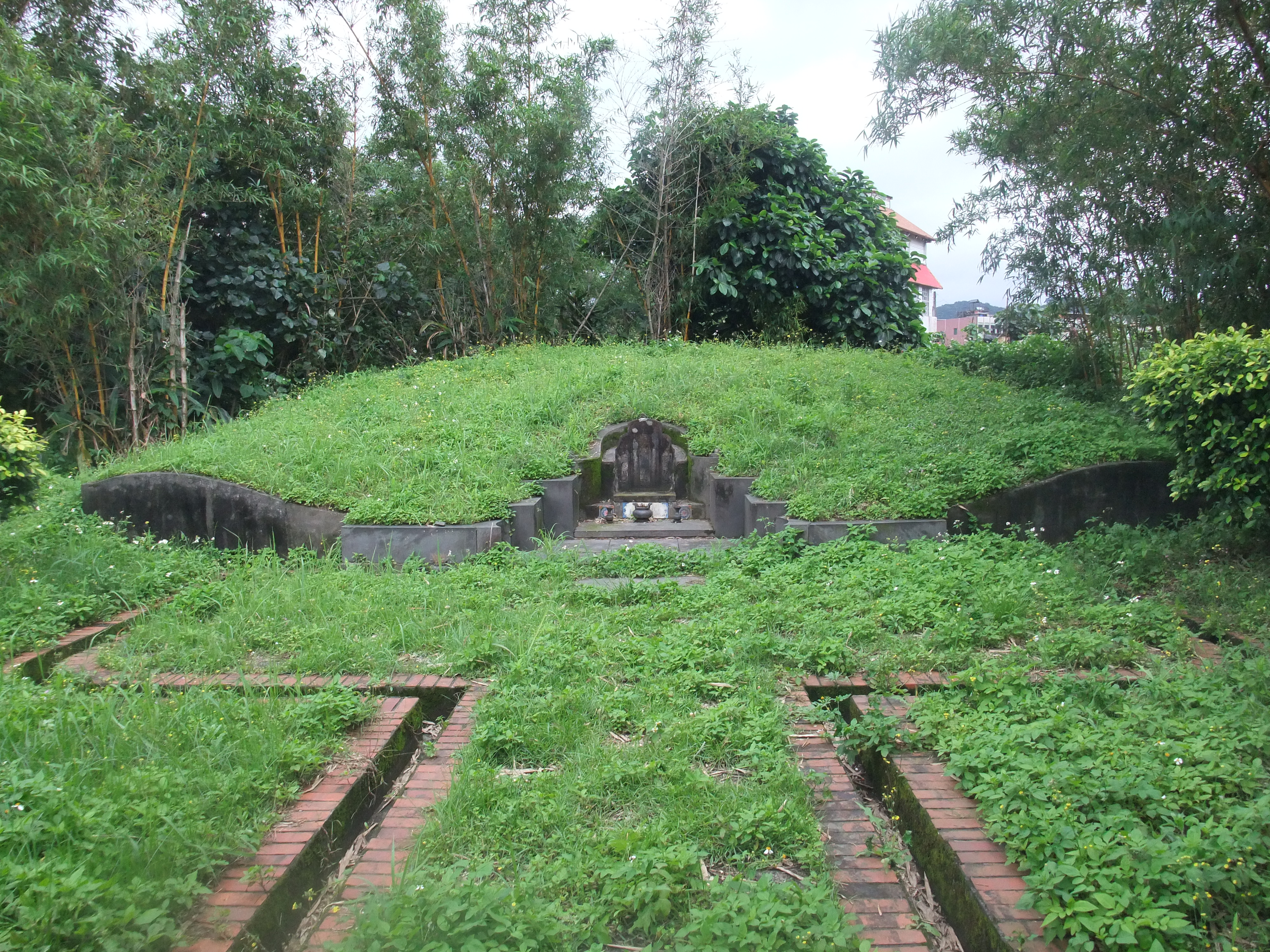 中文（台灣）: 吳沙墓一景